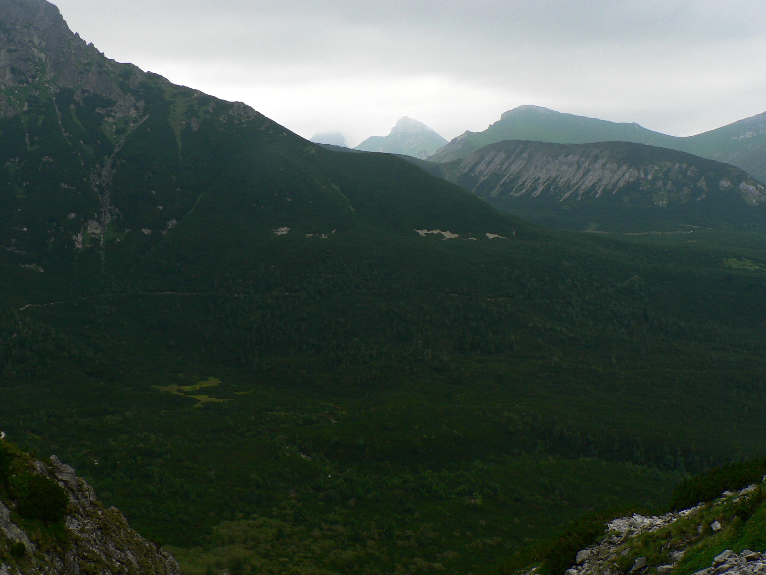 Dolina Kieżmarska z drogi na Rakuski Przechód, w tle Płaczliwa Skała i Szalony Wierch, pod nimi Kopa Bielska